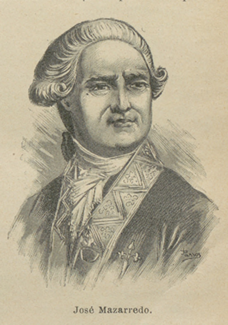 José Mazarredo.